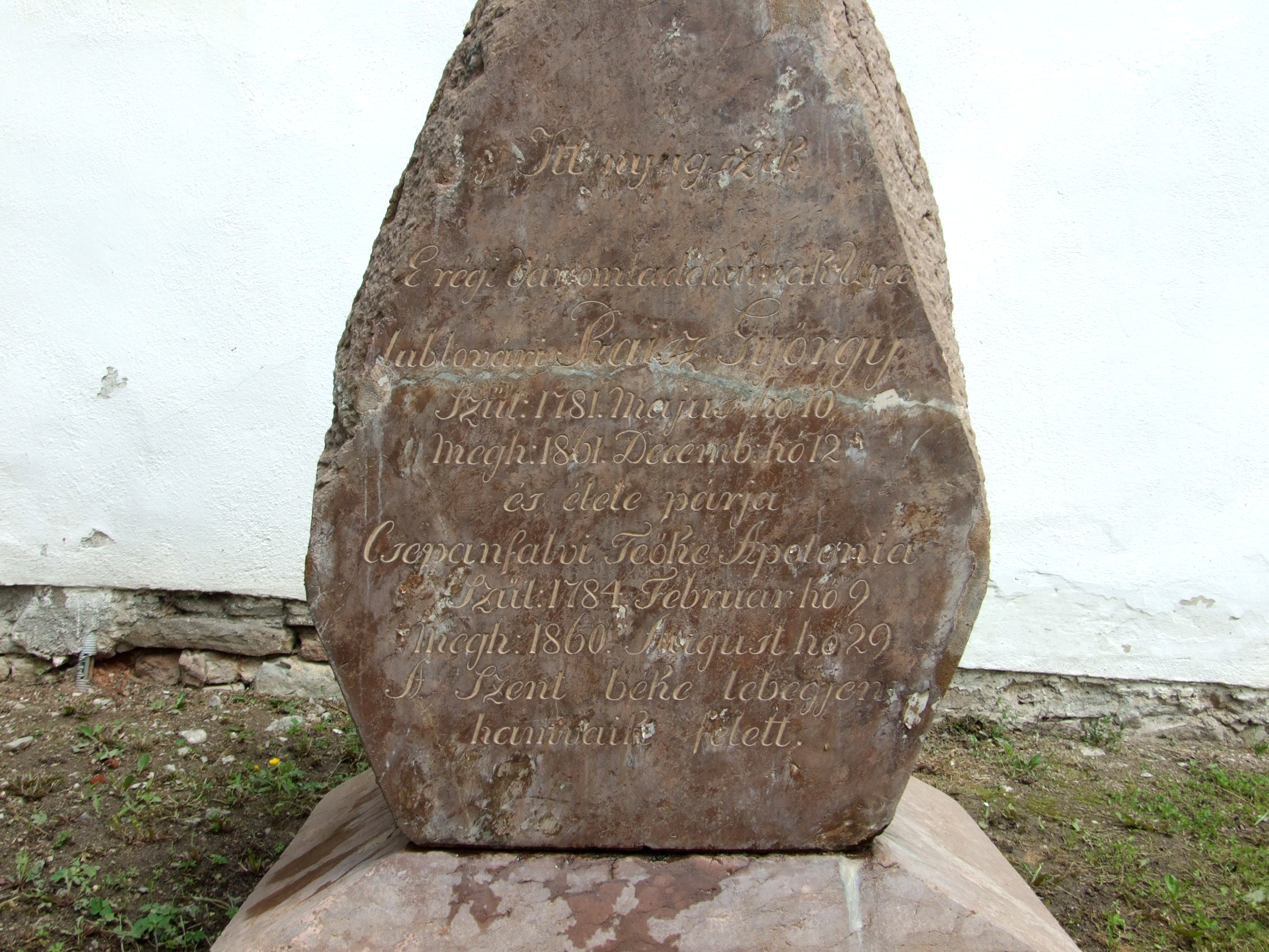 Hrad Ľubovňa, І pol. 14 st.